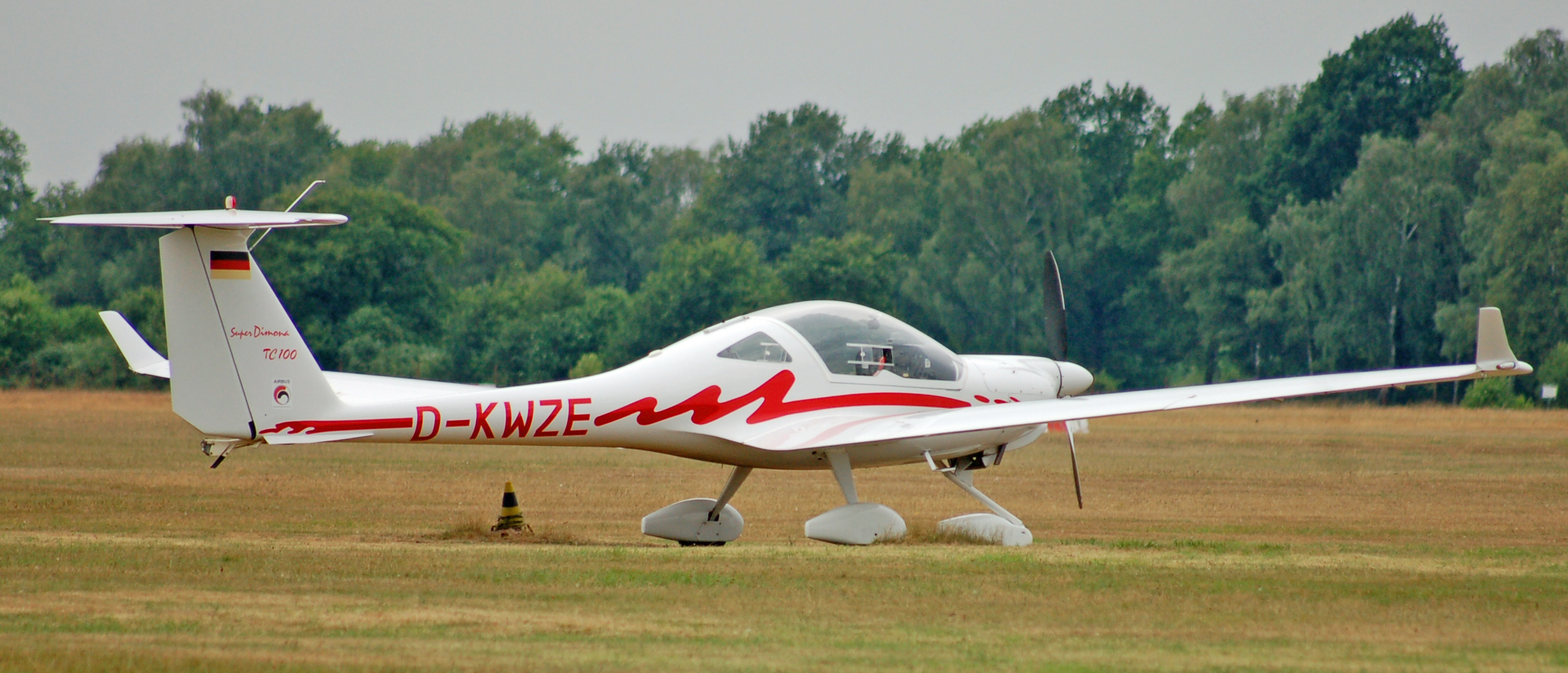 Diamond_HK36 "Super Dimona" TC 100 (D-KWZE) auf dem Flugplatz Uetersen